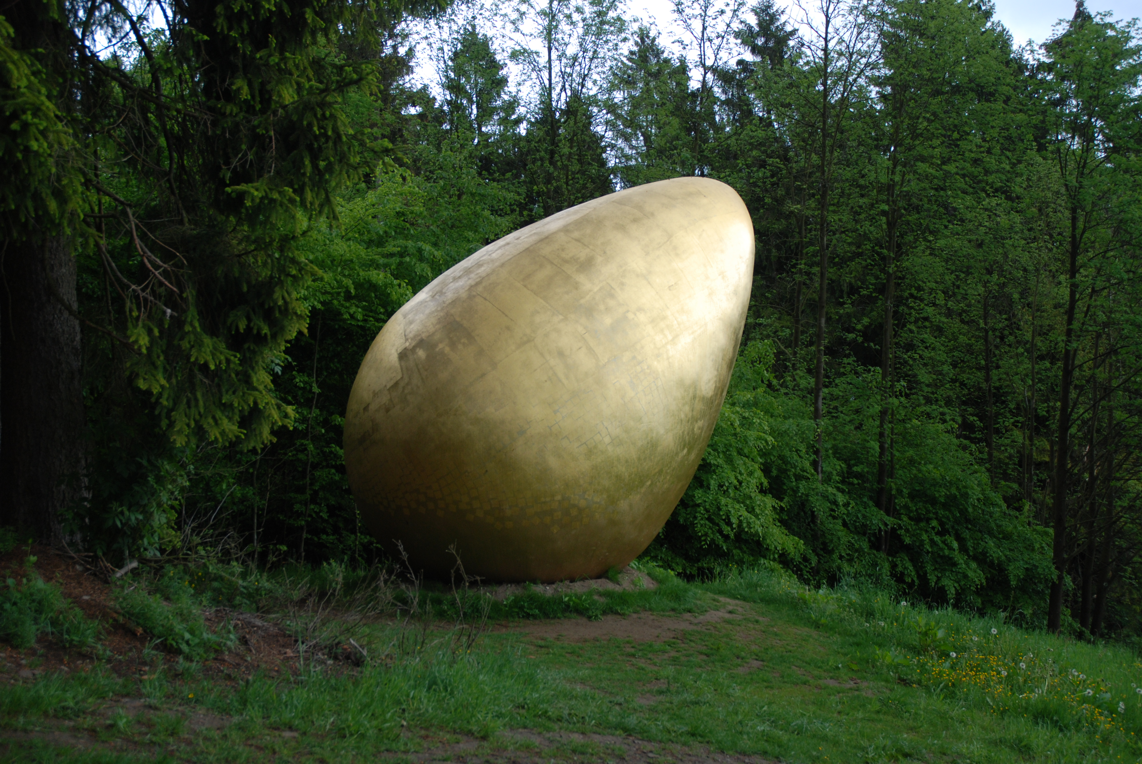 Magdalena Jetelová: Was war zuerst? (2007/2009), Skulptur auf dem Waldskulpturenweg Wittgenstein−Sauerland